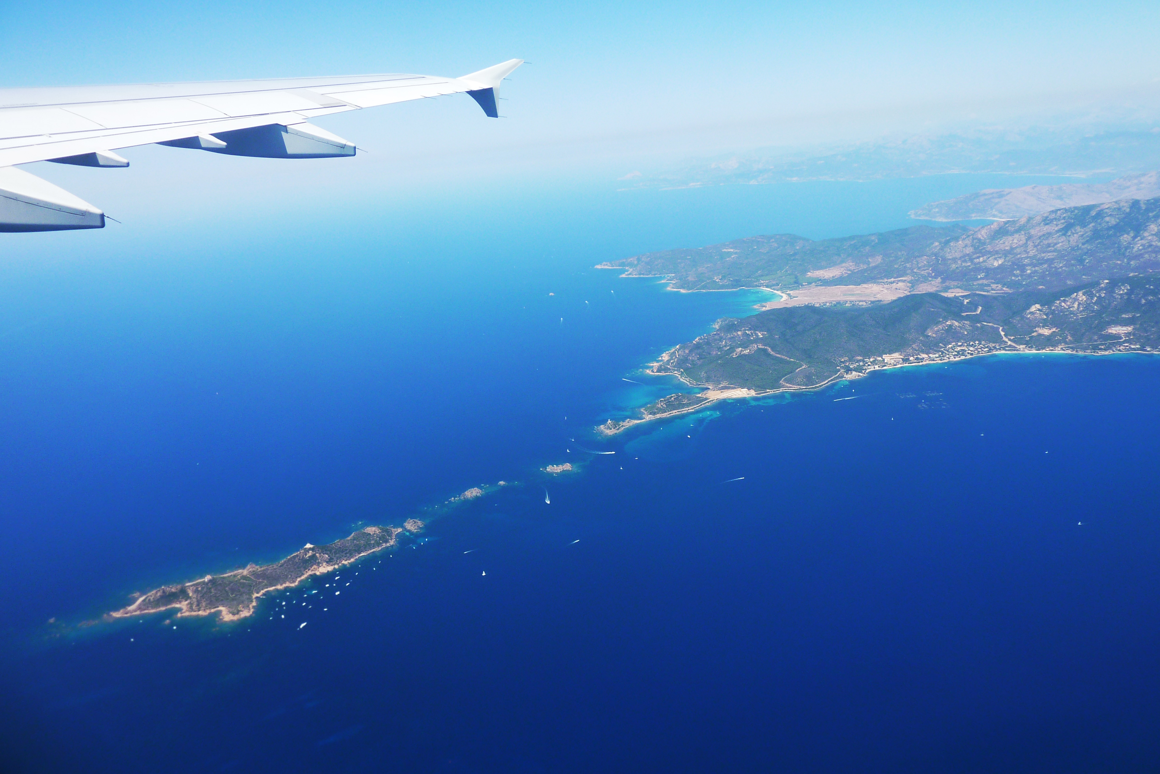 Ajaccio - Corse - Archipel des sanguinaires